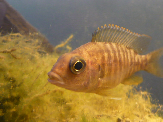 Female Aulonocara sp.